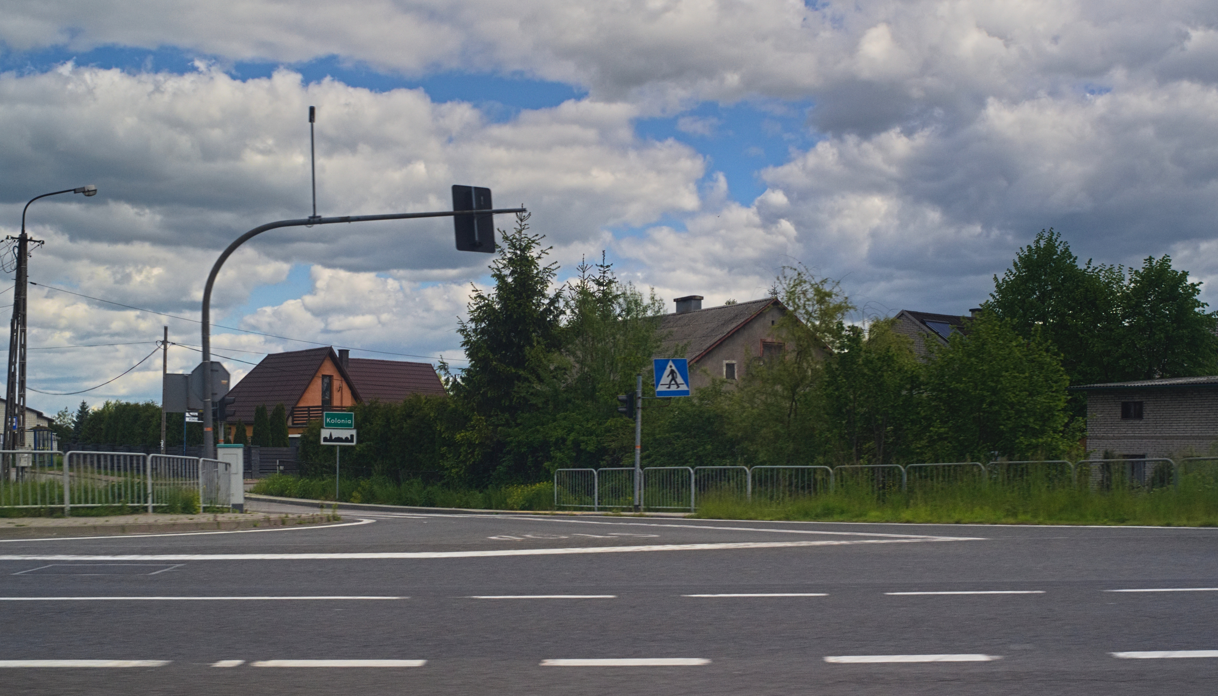 Kolonia (dawniej Ujków Nowy Kolonia), ul. Bolesławska, widok z okna busa jadącego drogą krajową nr 94